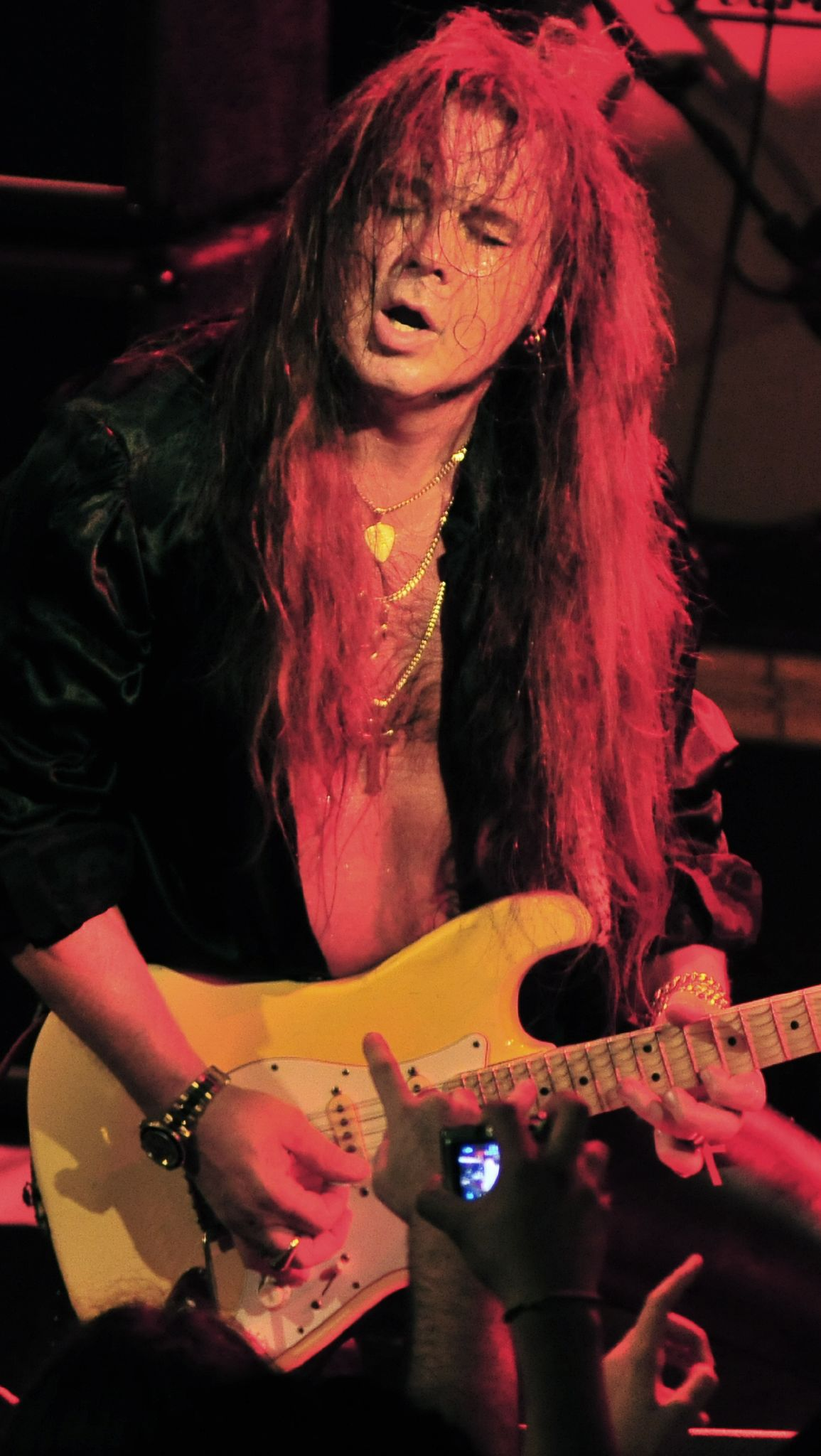 Concierto de Yngwie Malmsteen en la sala Apolo de Barcelona